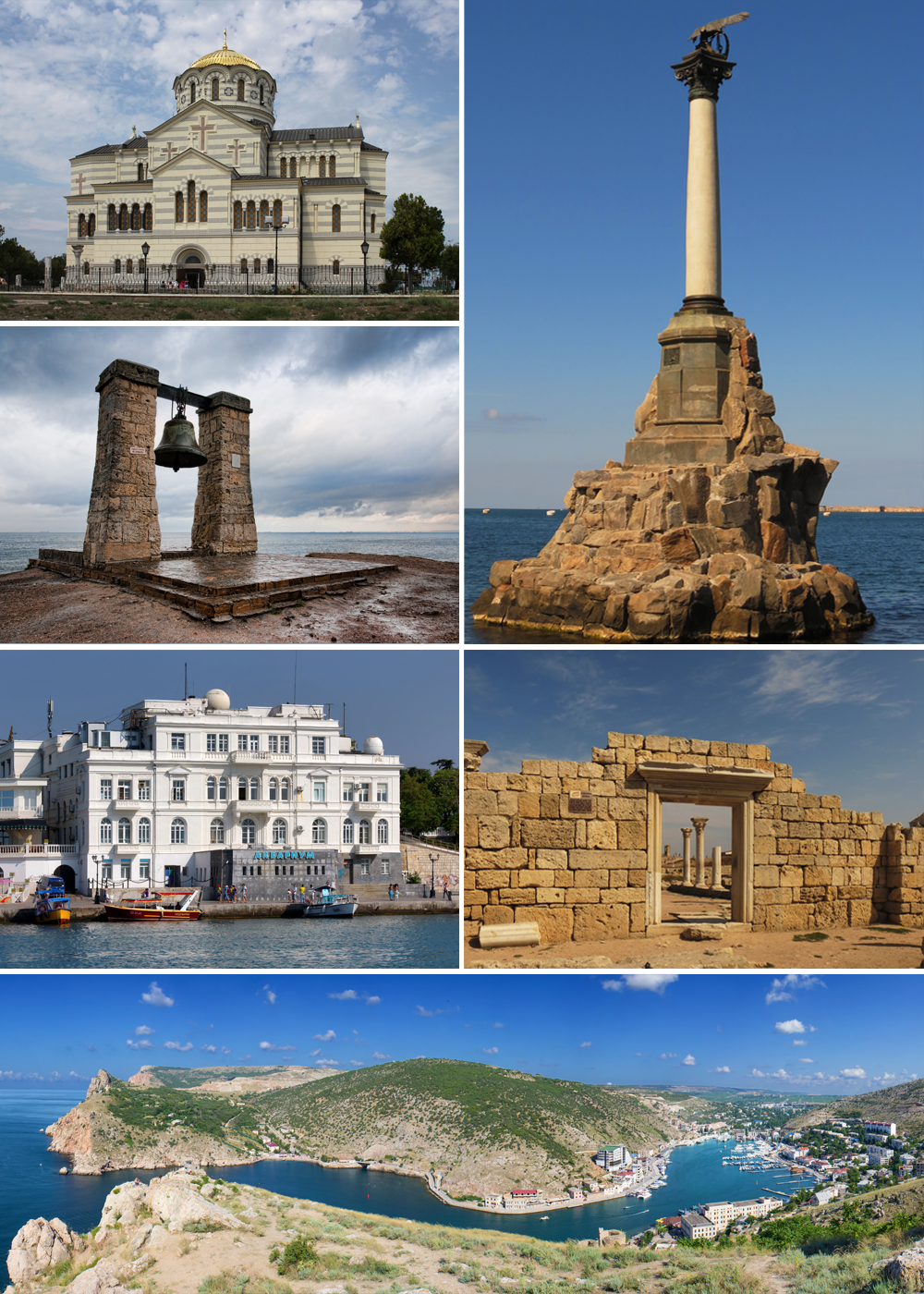 Коллаж из изображений для карточки города Севастополь^ Image:2012-09-09 Памятник затопленным кораблям в Севастополе (1).jpg, Art-top, CC-BY-SA 3.0 Image:St Vladimir Chersonesos 2012 G8.jpg, George Chernilevsky, CC-BY-SA 3.0 Image:Chersonesos Bell.jpg, Dmottl, CC-BY-SA 3.0 Image:2012-09-17 Базилика 1935 года. Херсонес Таврический (1).jpg, Art-top, CC-BY-SA 3.0 Image:Sevastopol Institute of biology of the Southern Seas IMG 4276 1725.jpg, Alexxx1979, CC-BY-SA 3.0 Image:Balaklava bay.jpg, Petar Milošević, CC-BY-SA 4.0